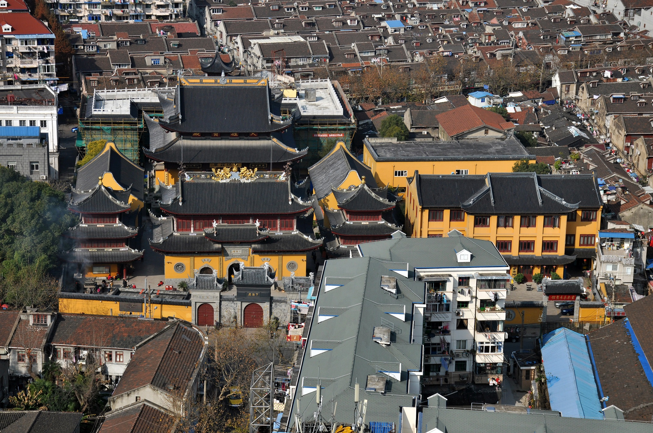 下海庙 昆明路73号